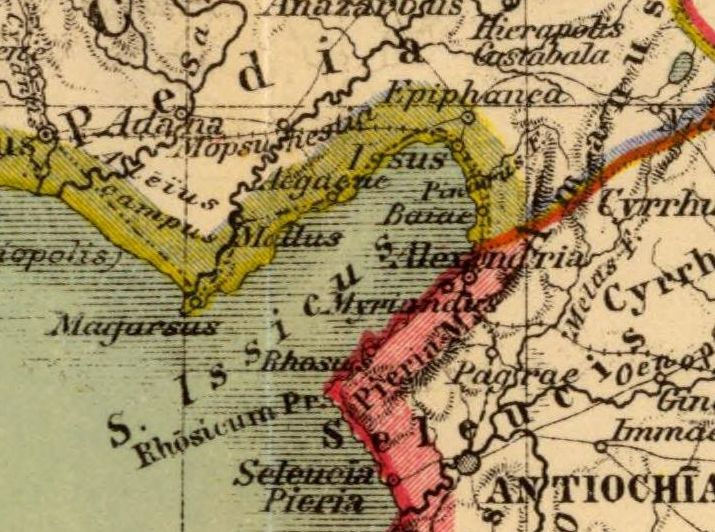 S.Issieus. Asia citerior. Auctore Henrico Kiepert Berolinensi. Geographische Verlagshandlung Dietrich Reimer (Ernst Vohsen) Berlin, Wilhemlstr. 29. (1903)